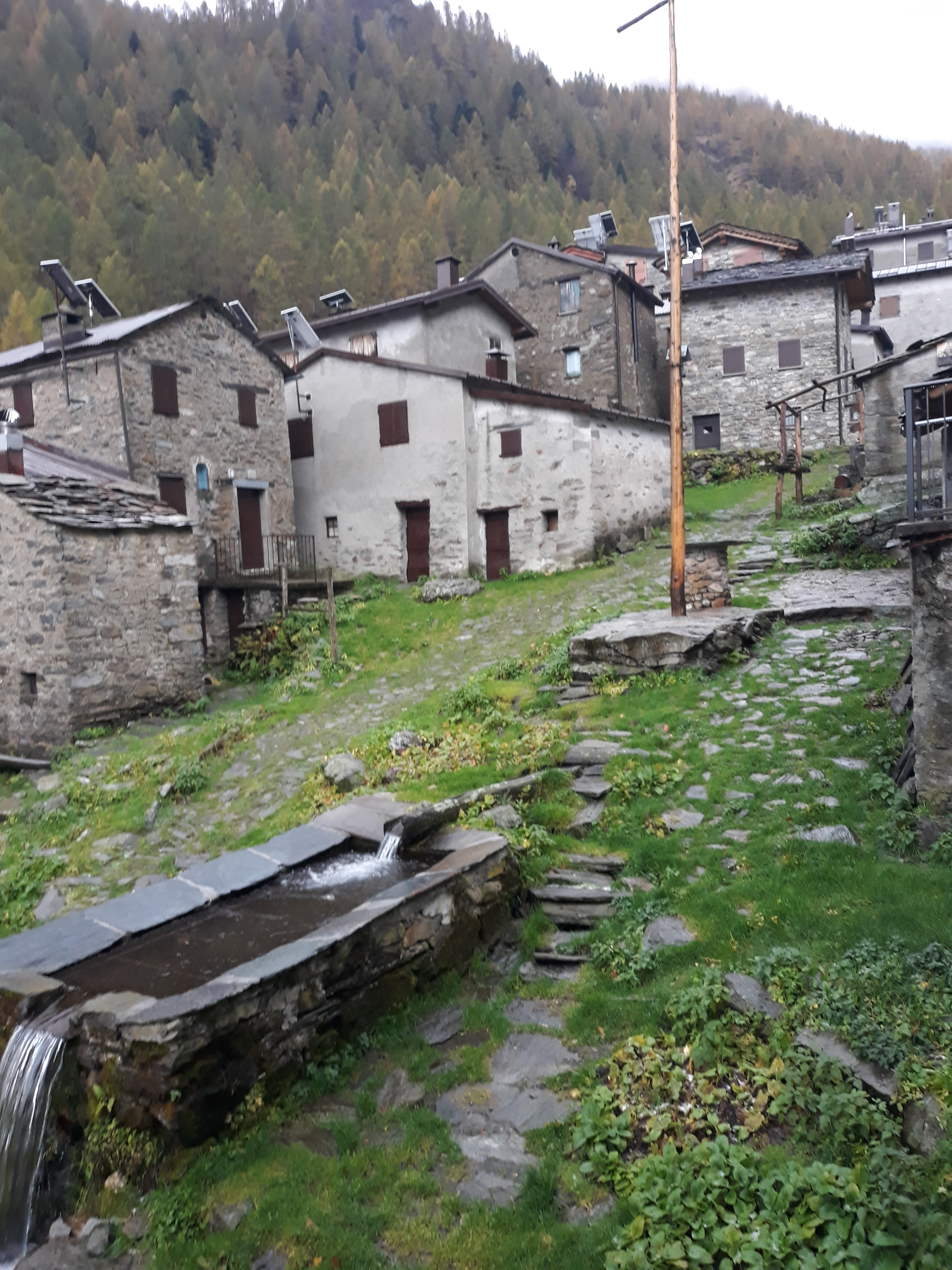 Vista centro Alpeggio